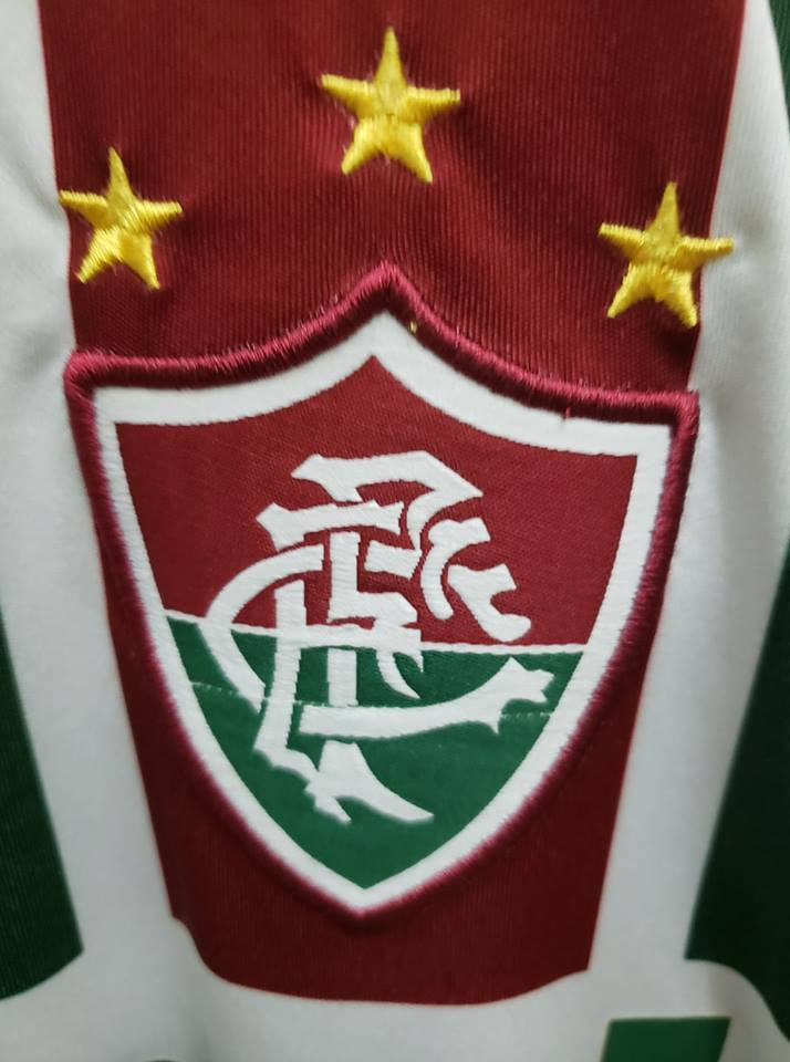 As 3 estrelas obre o escudo o Fluminense Football Club.